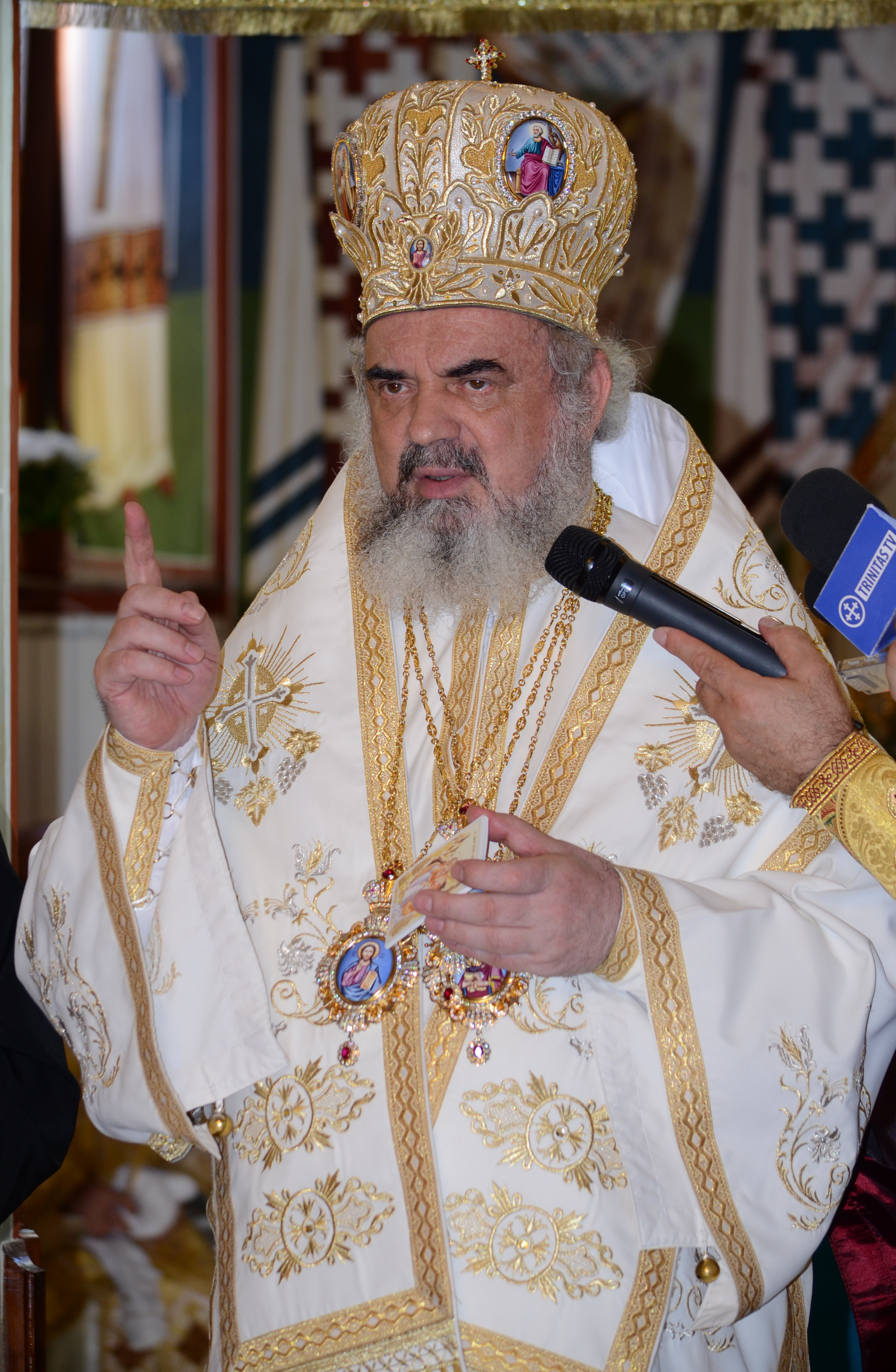 Patriarhul Daniel, la târnosirea Bisericii Sfântul Ilie din cartierul Titan, București